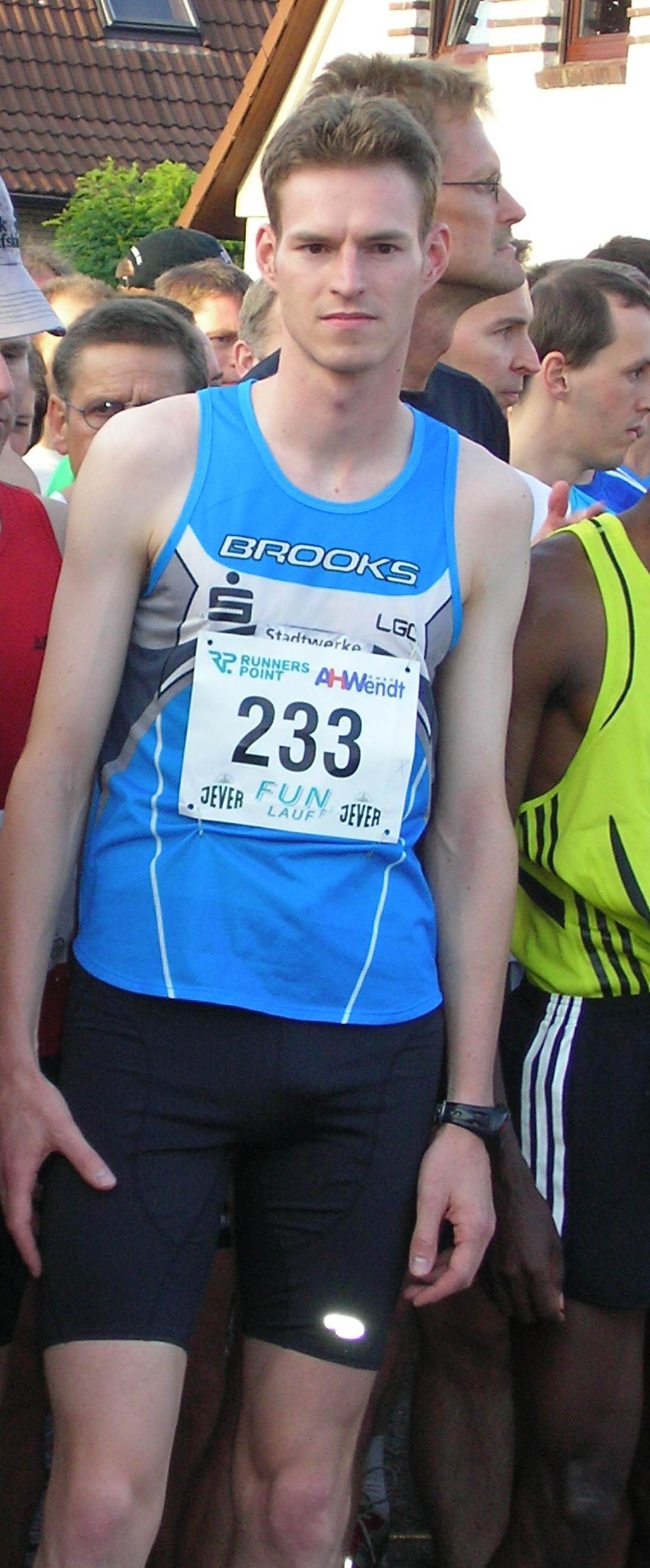 Ansgar Varnhagen 2008 in Schortens